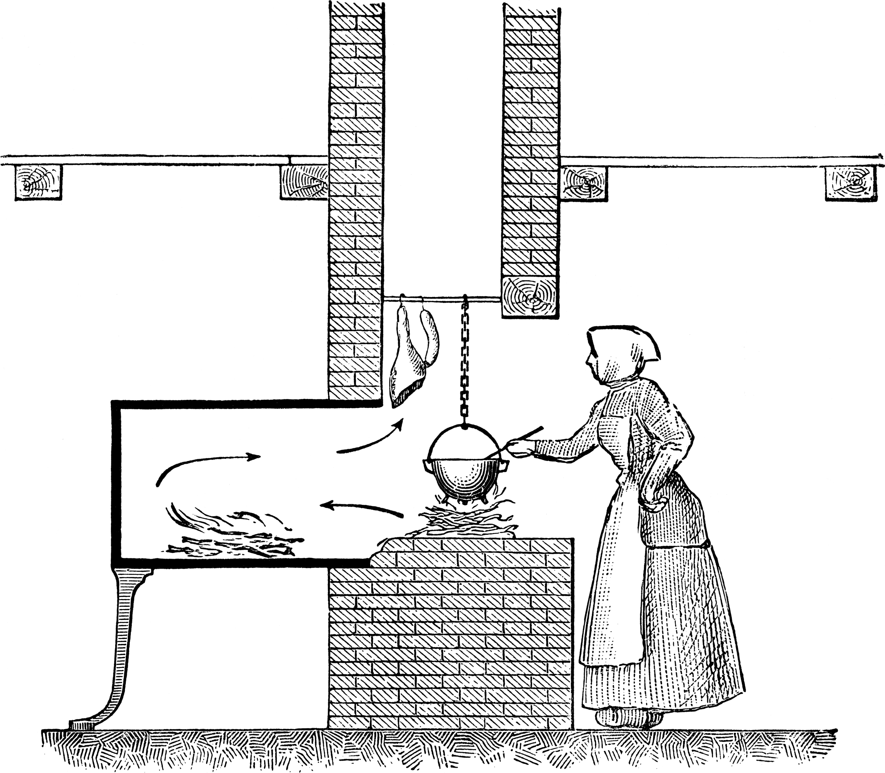 Åben Skorsten med Bilæggerovn